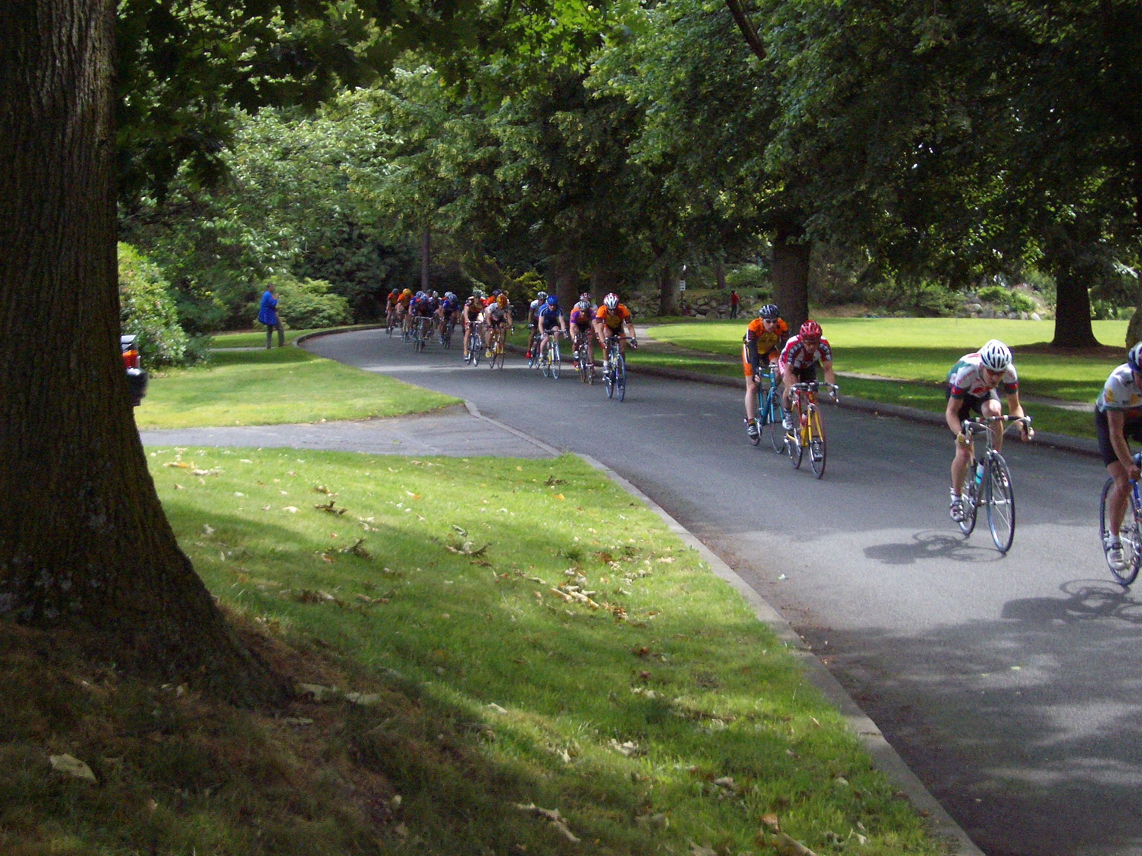 Bike race at Volunteer ParkVolunteer Park Bike Race